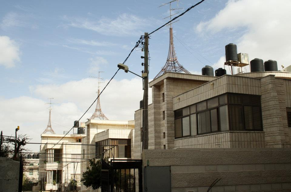 Toits d'un quartier résidentiel de Ramallah avec antennes radioélectrique en forme de Tour Eiffel.